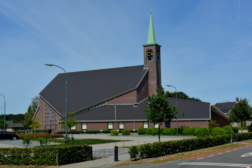 Hersteld Herfoarme Tsjerke fan Elspeet